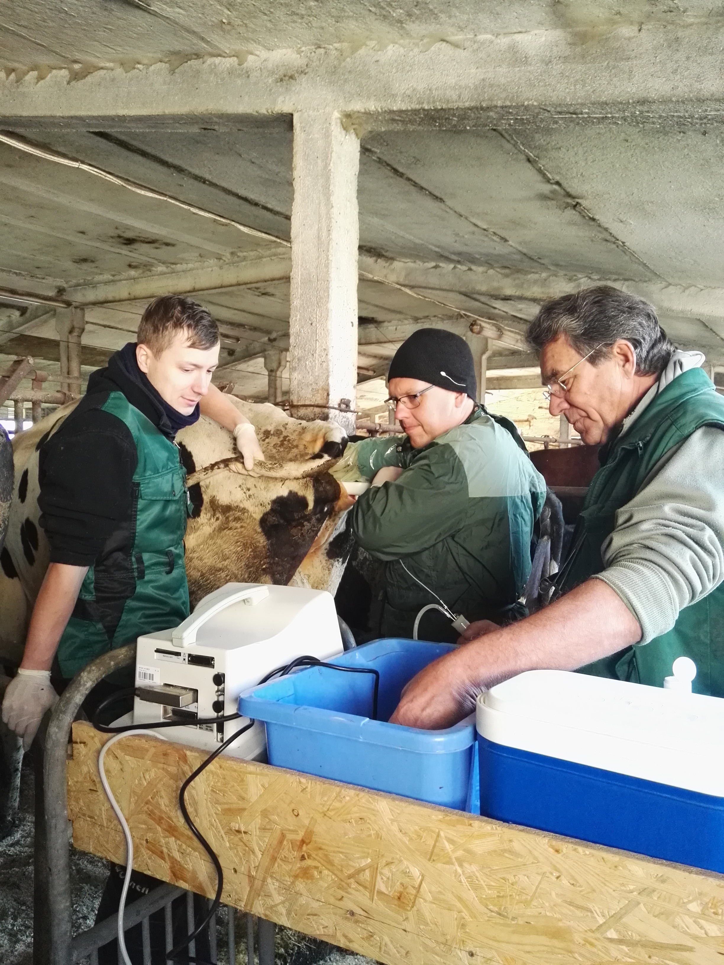 Eesti Maaülikooli loomaarstid (paremalt) Jevgeni Kurõkin, Ants Kavak ja Andres Reilent teostamas veise transvaginaalset foliikulipunktsiooni